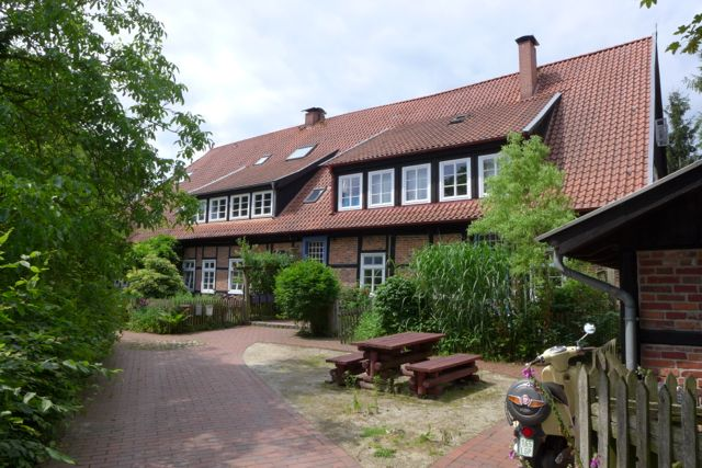 Majorshof. Ehemaliges Herrenhaus des Rittergutes Eversen II.